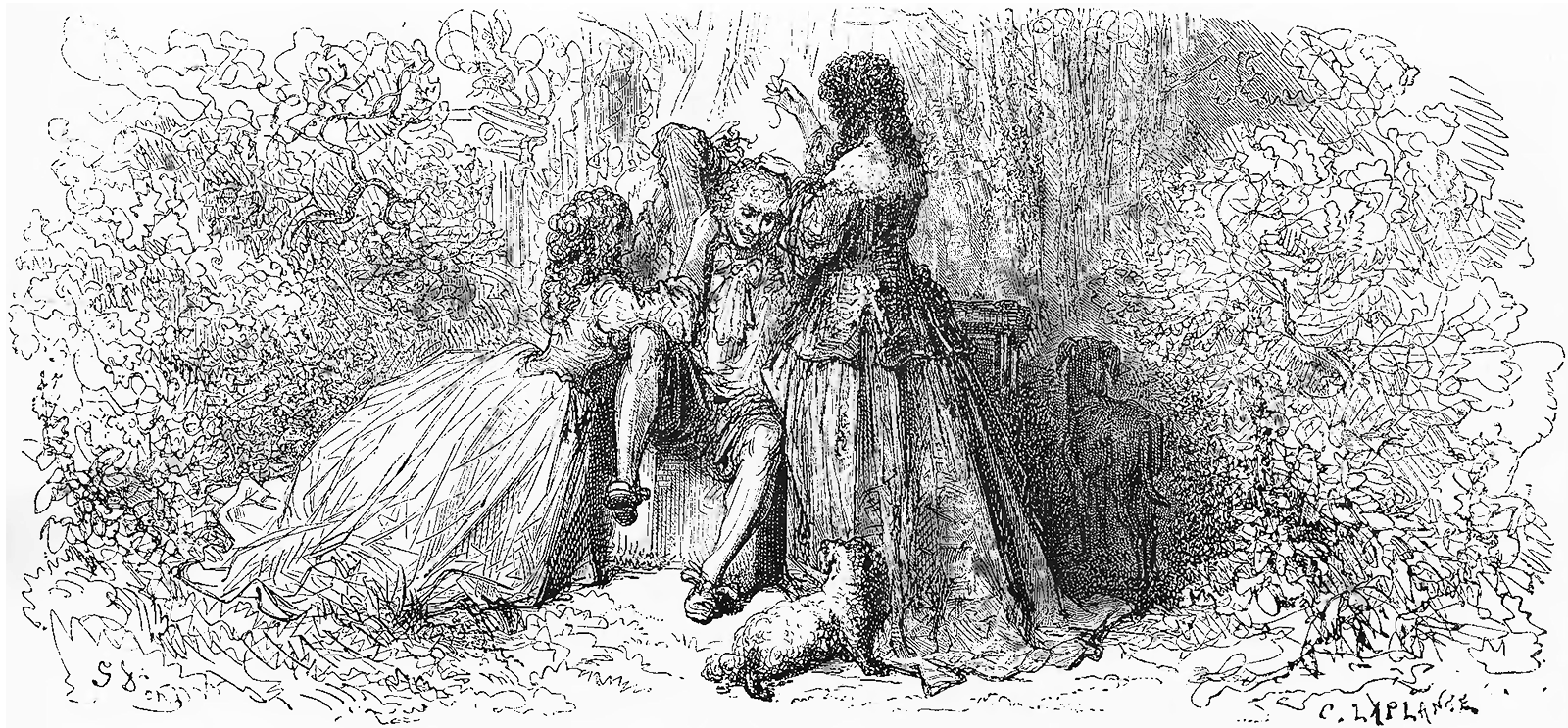 grafika z książki PL Bajki, Jean de La Fontaine, nakładem i drukiem Jana Noskowskiego, Warszawa 1876